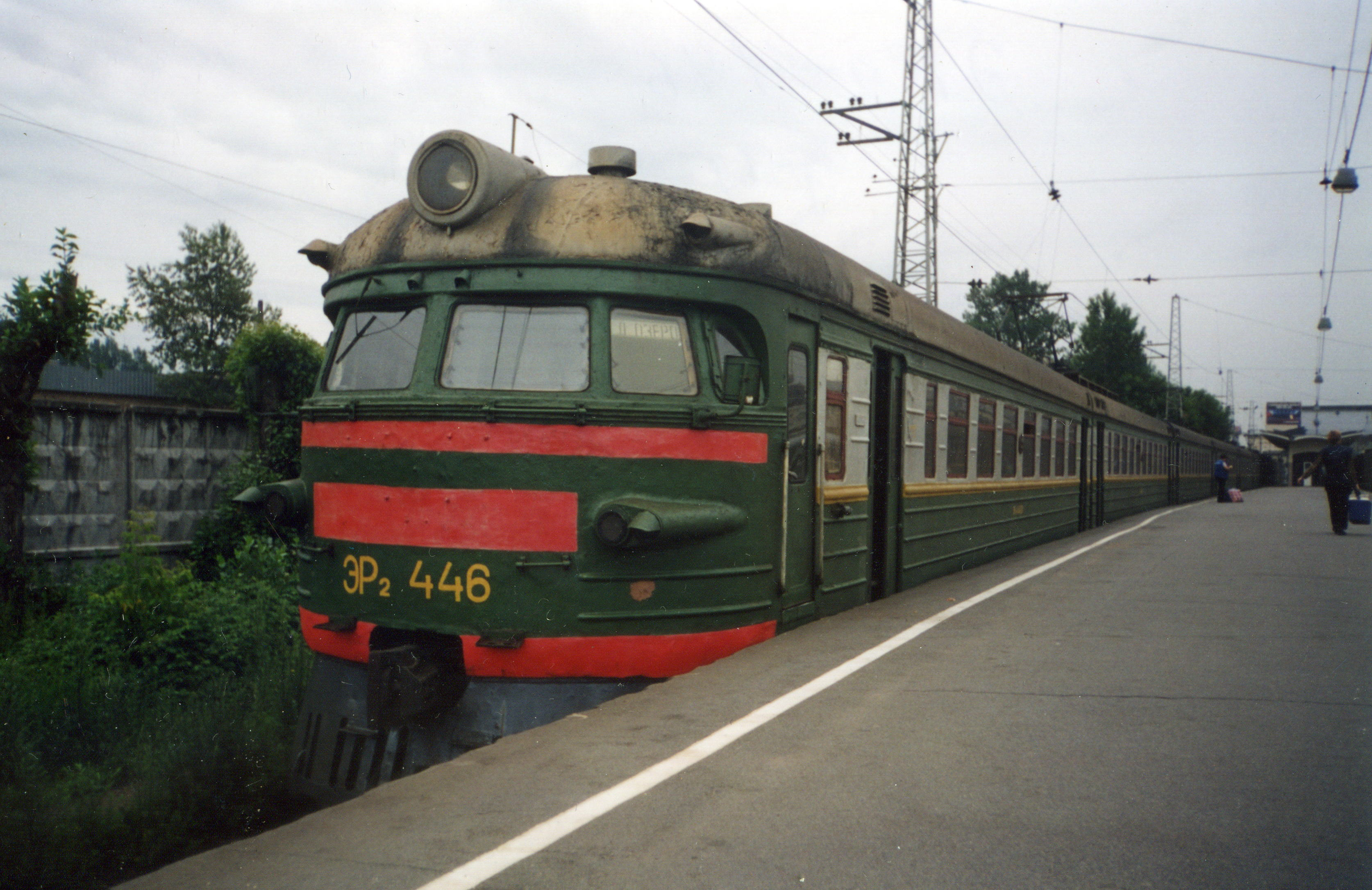 Электропоезд ЭР2-446 на Финляндском вокзале (Санкт-Петербург)